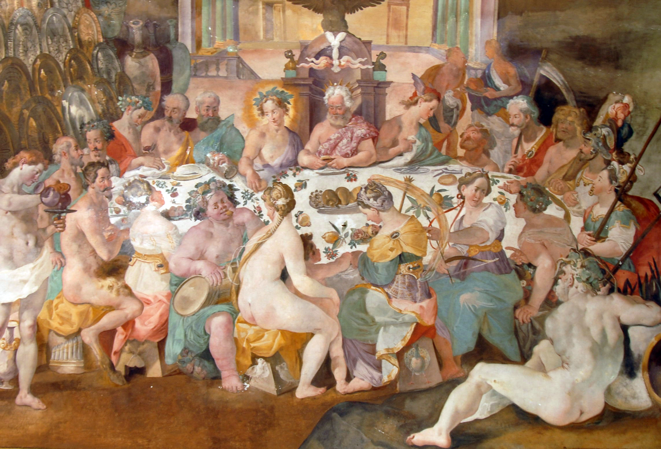 Convivio degli deititle QS:P1476,it:"Convivio degli dei" label QS:Lit,"Convivio degli dei"